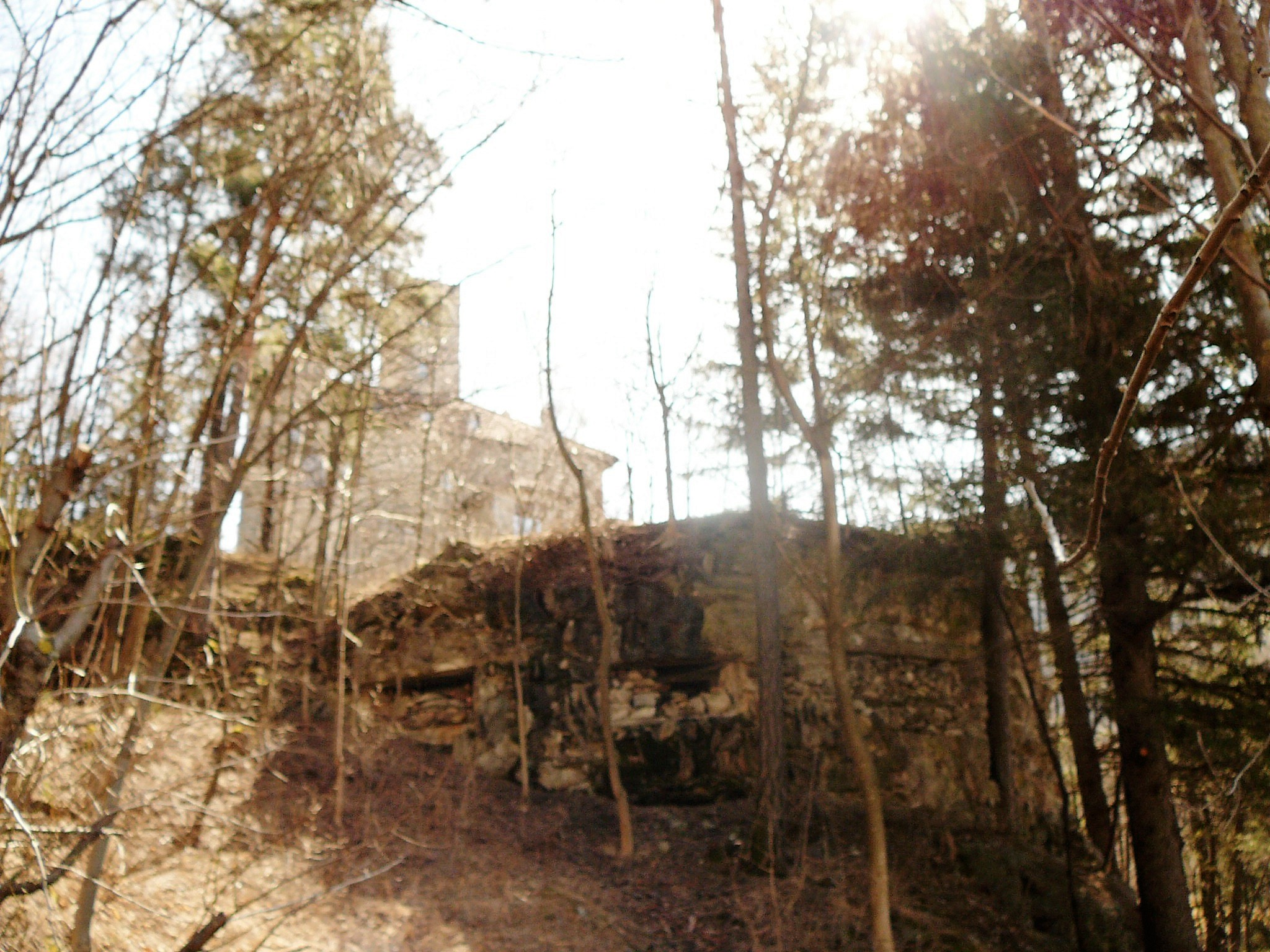 Castel Guelfo e l'opera 1bis